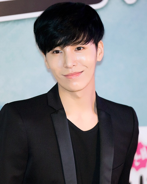 140210-연애징크스-vip시사회노민우